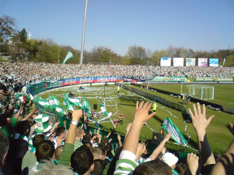 Derby Trojmiasta w kwietniu 2009. Lechia 2:1 Arka Bramki – 75. minuta, Piotr Wiśniewski na 1:0, 79. minuta, Paweł Buzała na 2:0 i 95. minuta, Przemysław Trytko na 2:1